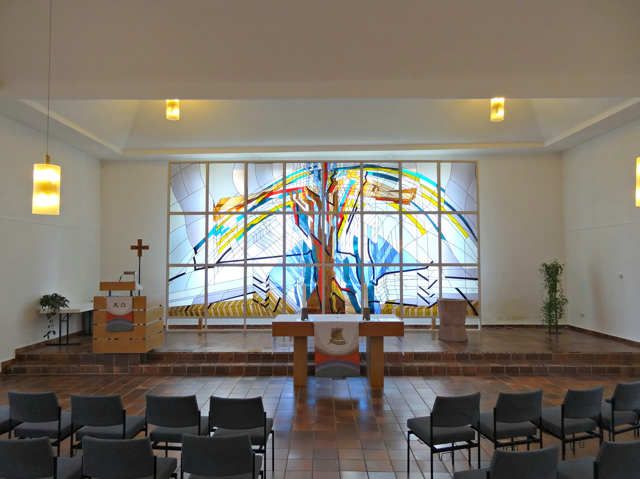 Evangelische Kapelle (Bad Salzhausen)